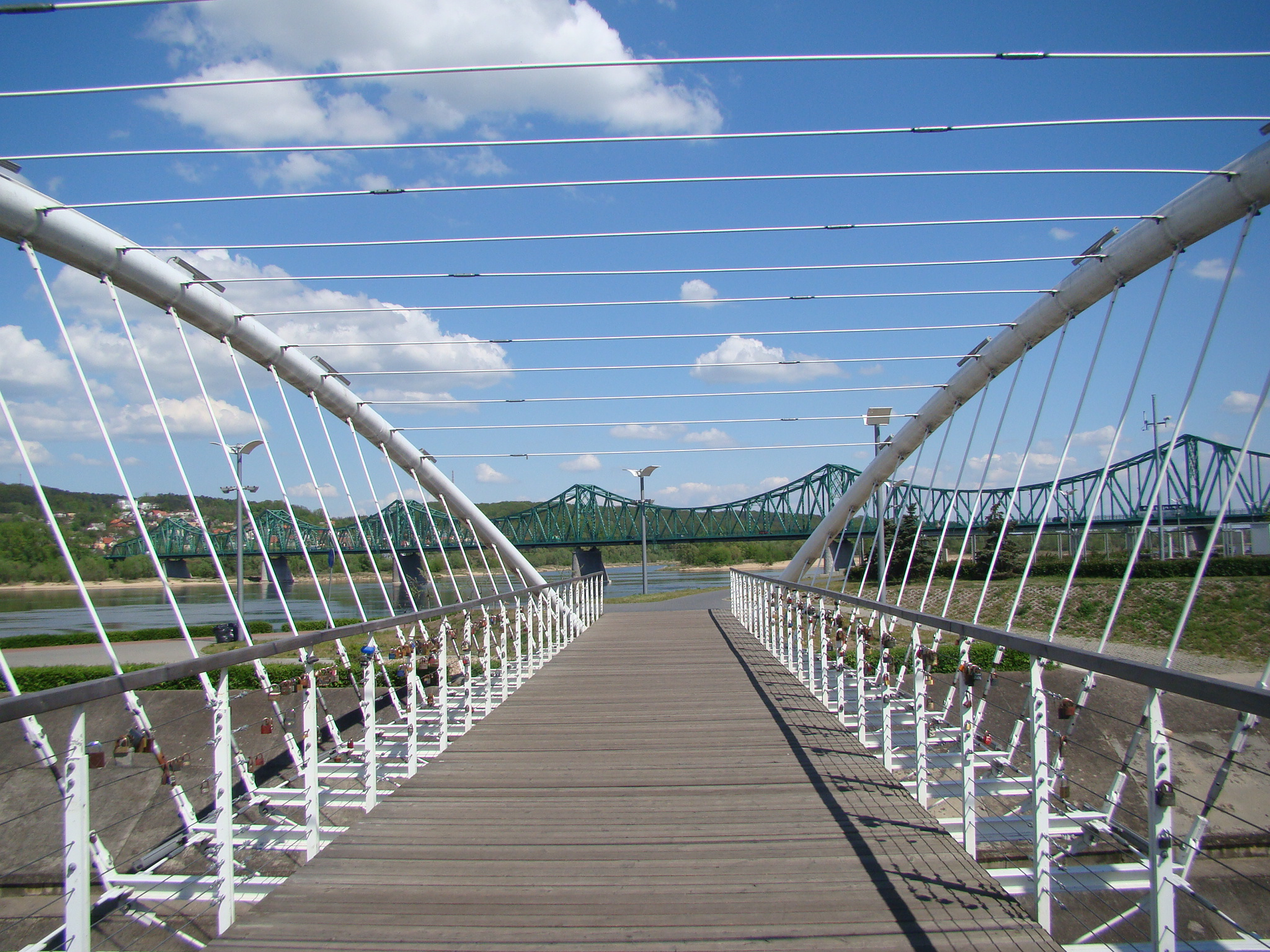 Włocławek - przystań na Wiśle